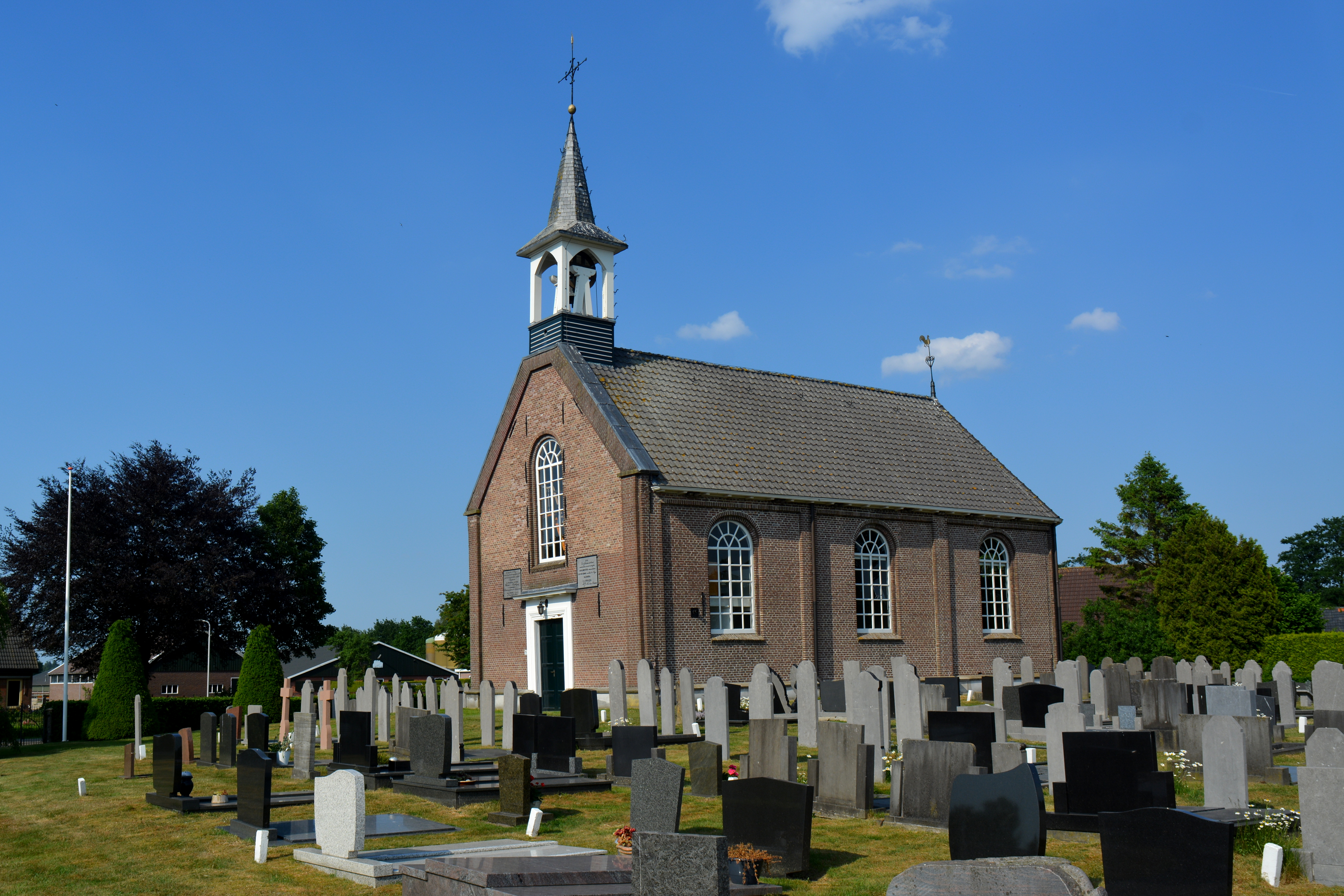 De Haule, protestanske tsjerke